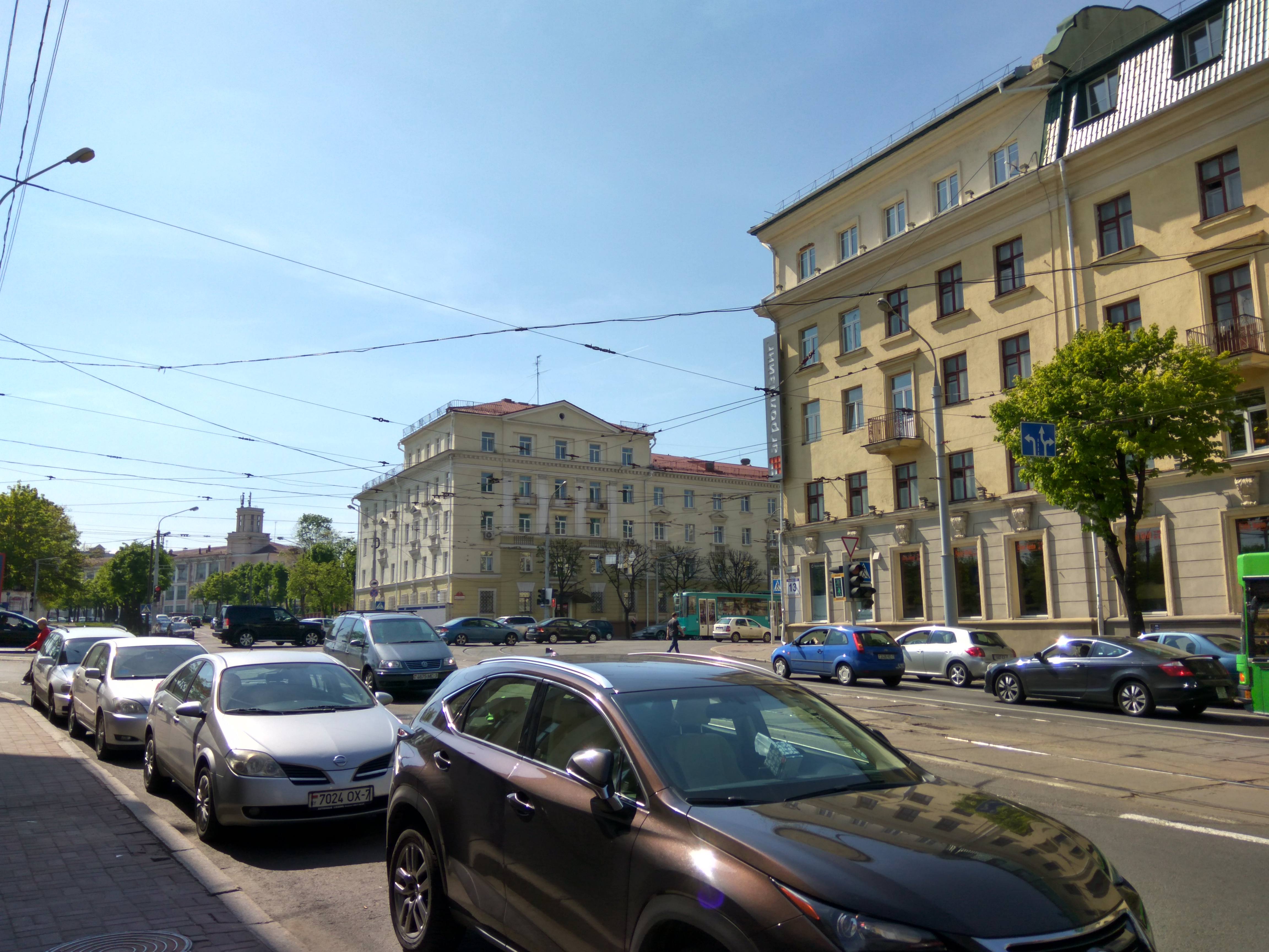 Мінск. Вуліца Чырвоная (Красная) / Праспект Машэрава